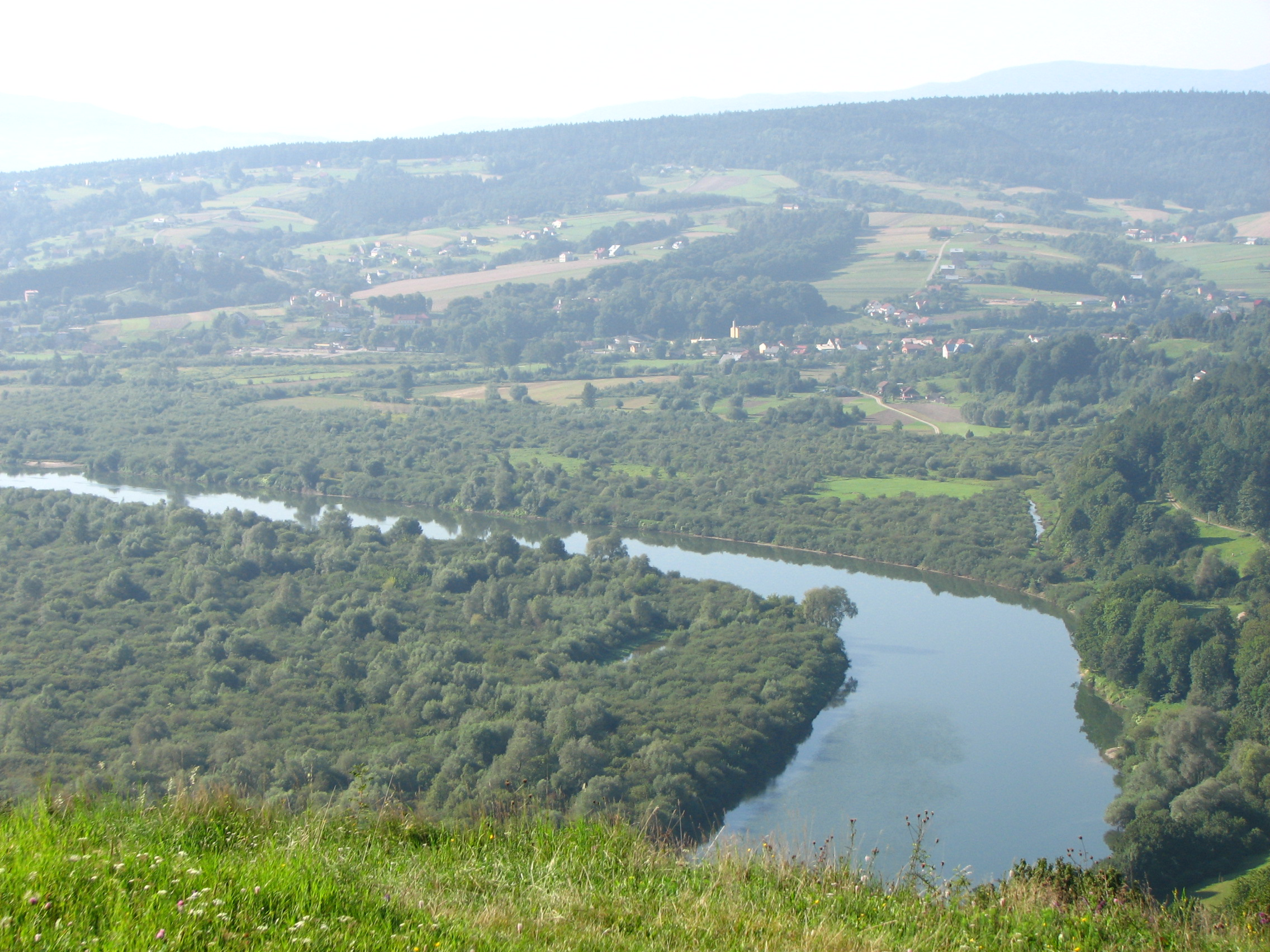 Widok z Białowodzkiej Góry na południowy zachód. Rzeka Dunajec, dalej wieś Marcinkowice.